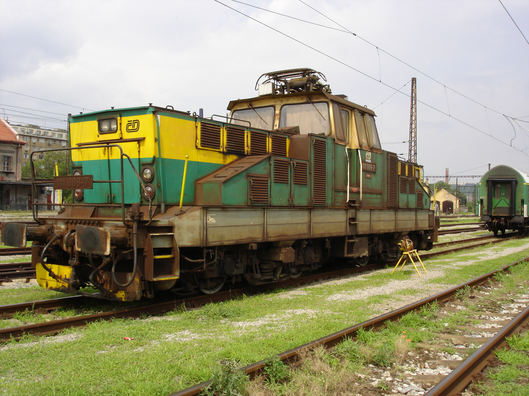 El. lokomotiva stojící na nádraží Praha Bubny. Mrkvo 21:22, 17. 11. 2005 (UTC)